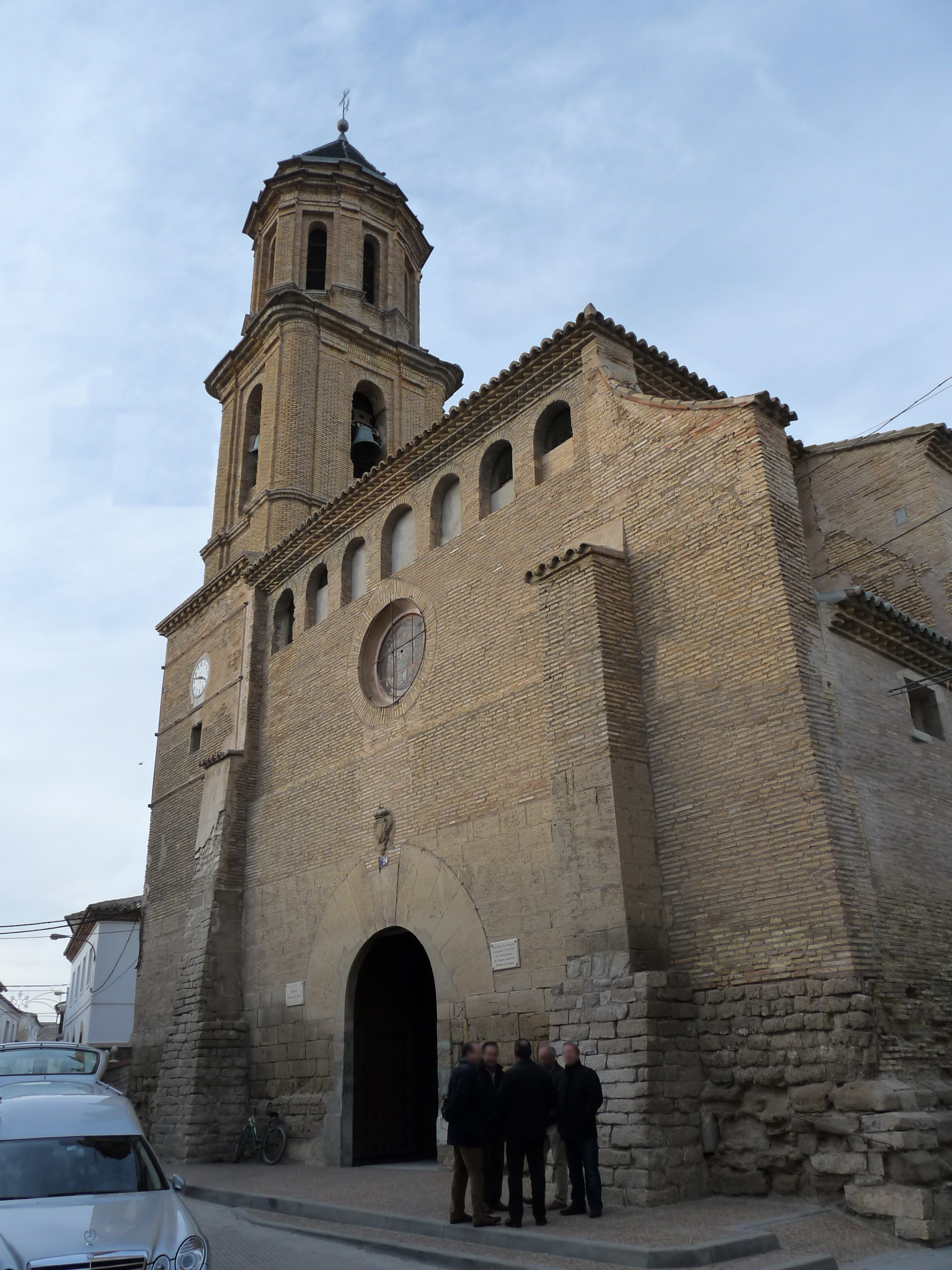 Bujaraloz - Iglesia de Santiago el Mayor (s. XVI) - Fachada